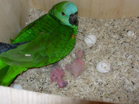 Bébé amazone à front bleu de 1 et 2 jours